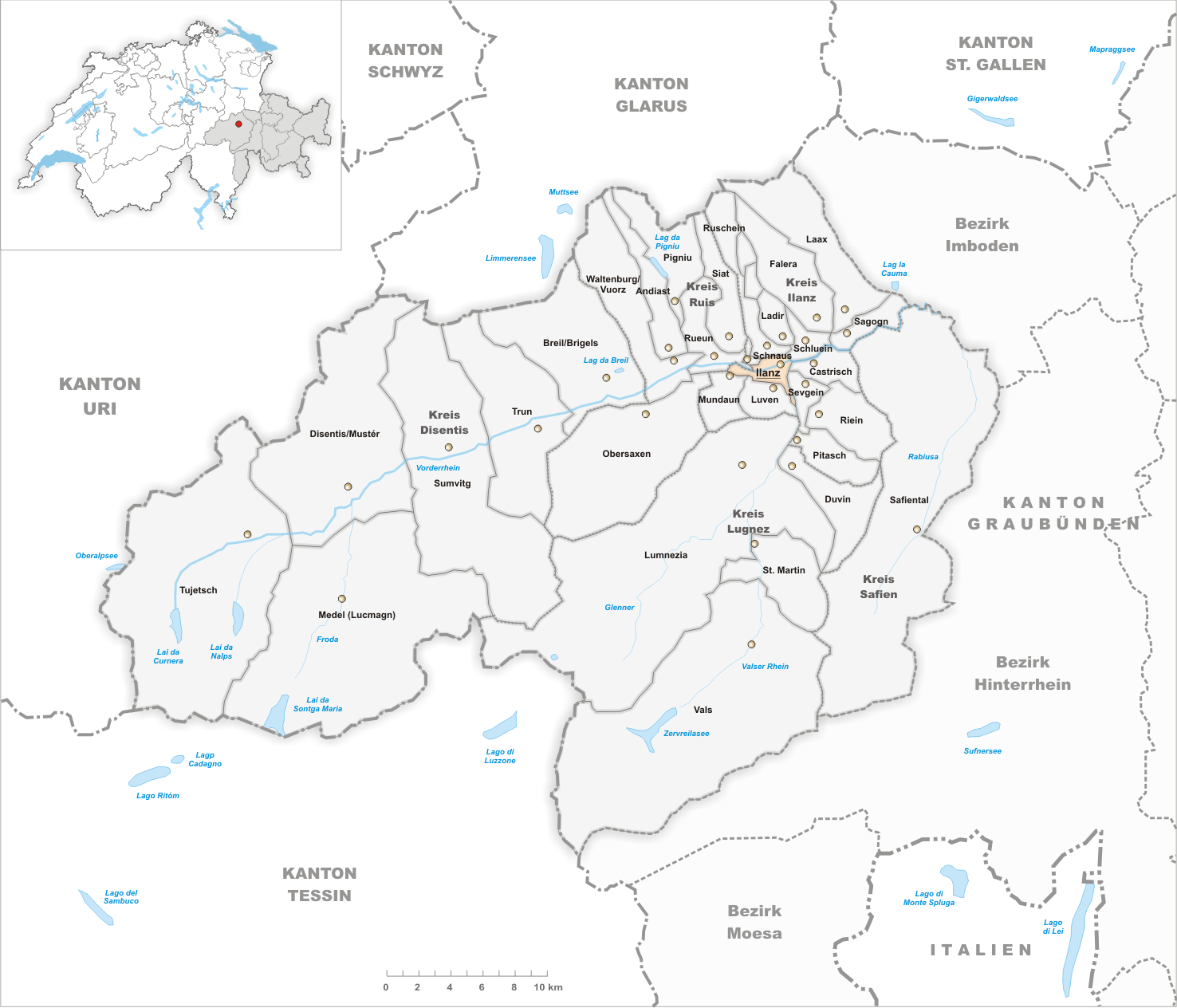 Municipality Ilanz